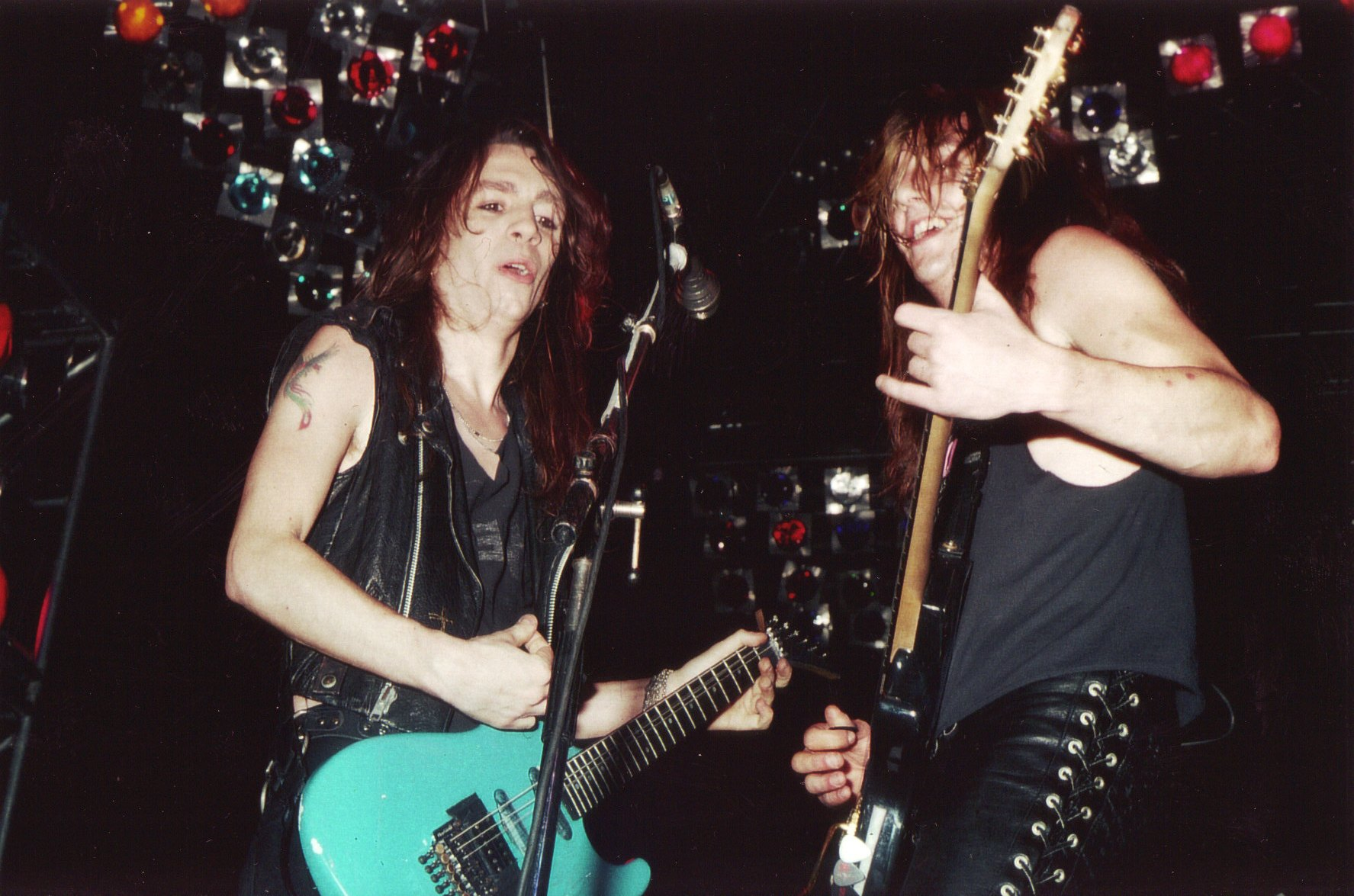 Dave "Snake" Sabo y Scotti Hill, guitarristas de Skid Row, actuando en París, Francia el 30 de octubre de 1989.